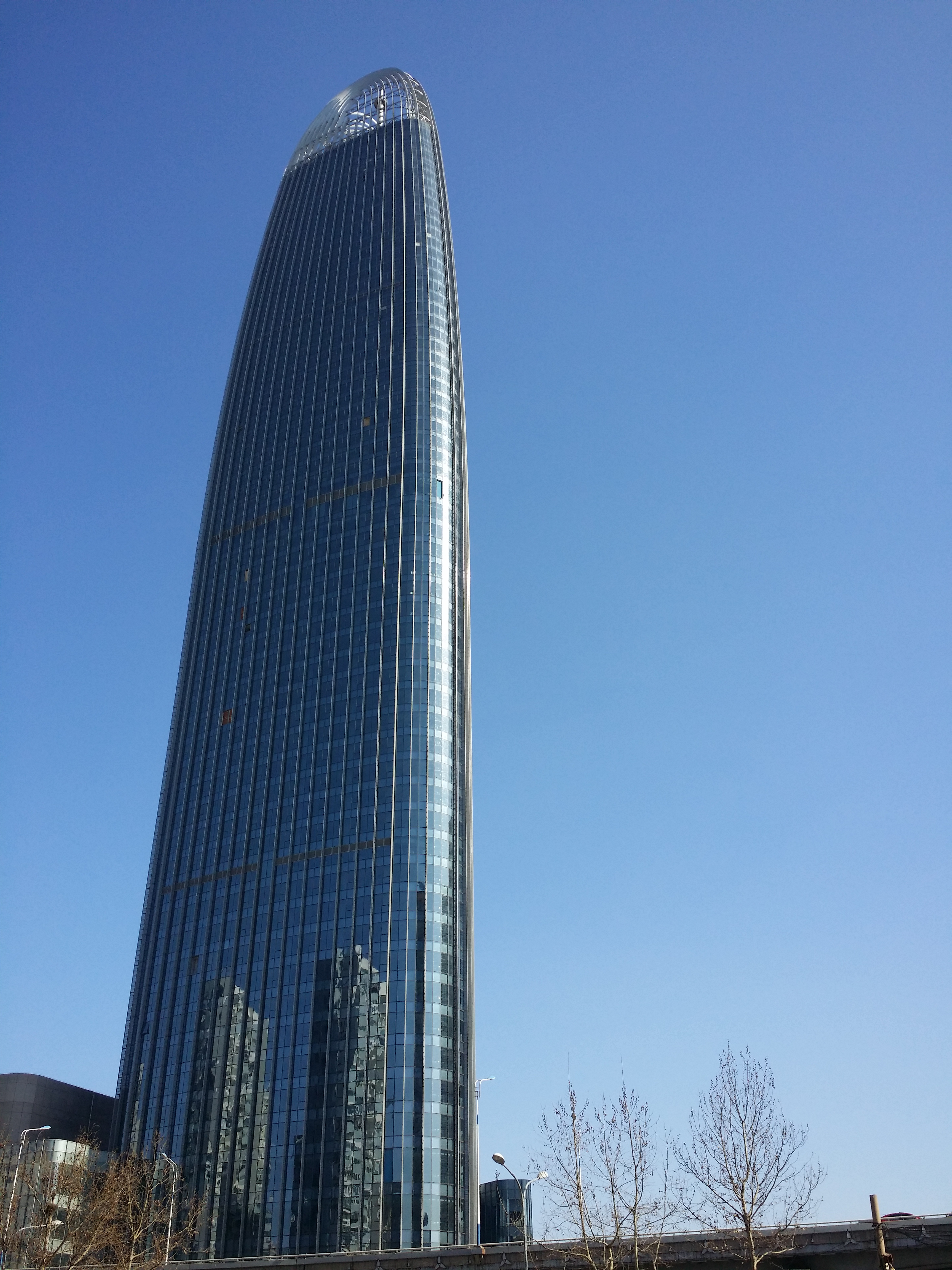 Jinanlvdi-20150130